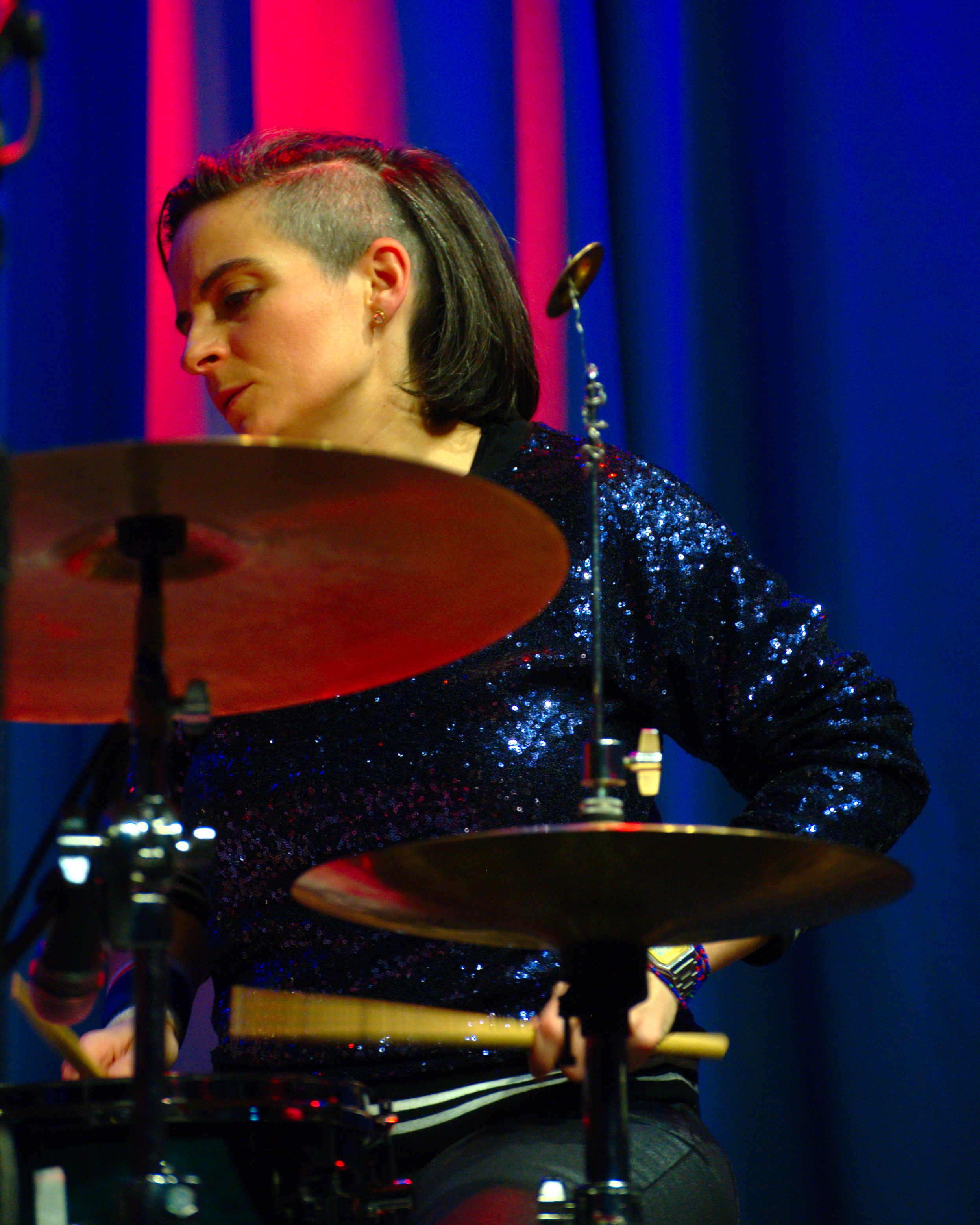 Lucía Martínez in einem Konzert mit Agustí Fernández auf dem just music ‘17 - Beyond Jazz Festival Wiesbaden am 18.02.2017